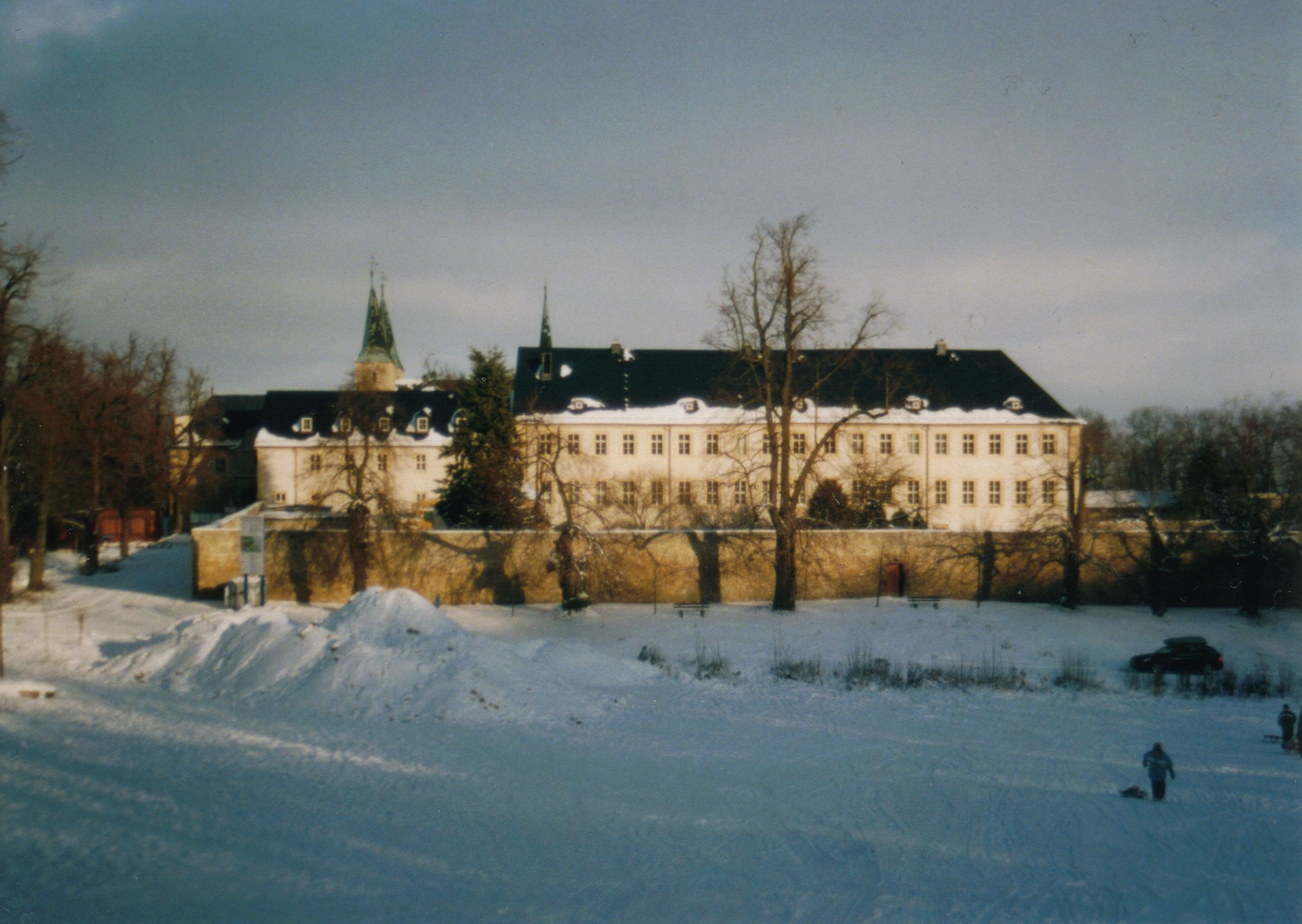 Description: Kloster Huysburg, Ansicht im Winter Source: Practika MTL 5b Date: 31. Dezember 2005 Author: Frank Richter, Dessau Other versions of this file